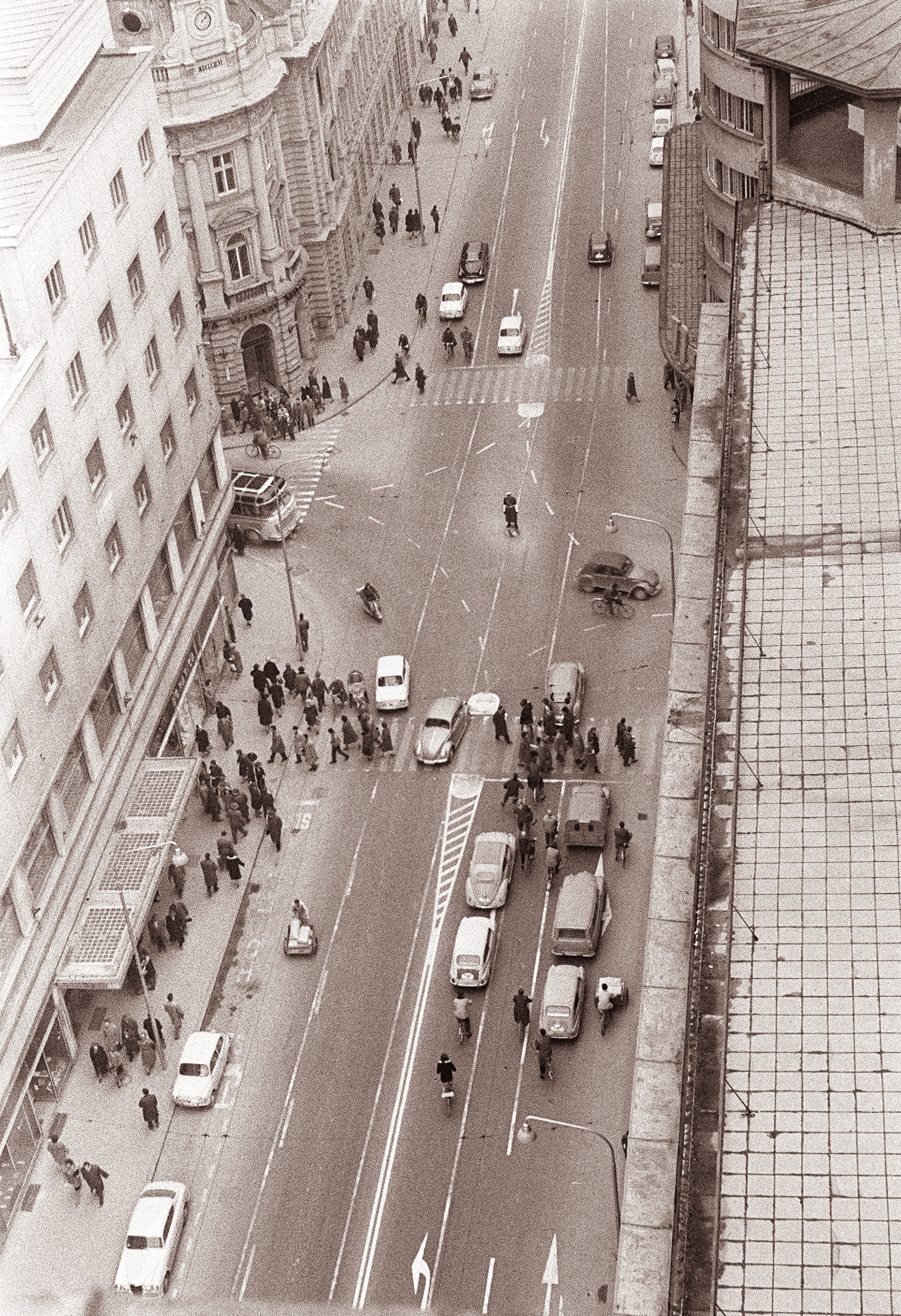 Titova cesta v Ljubljani